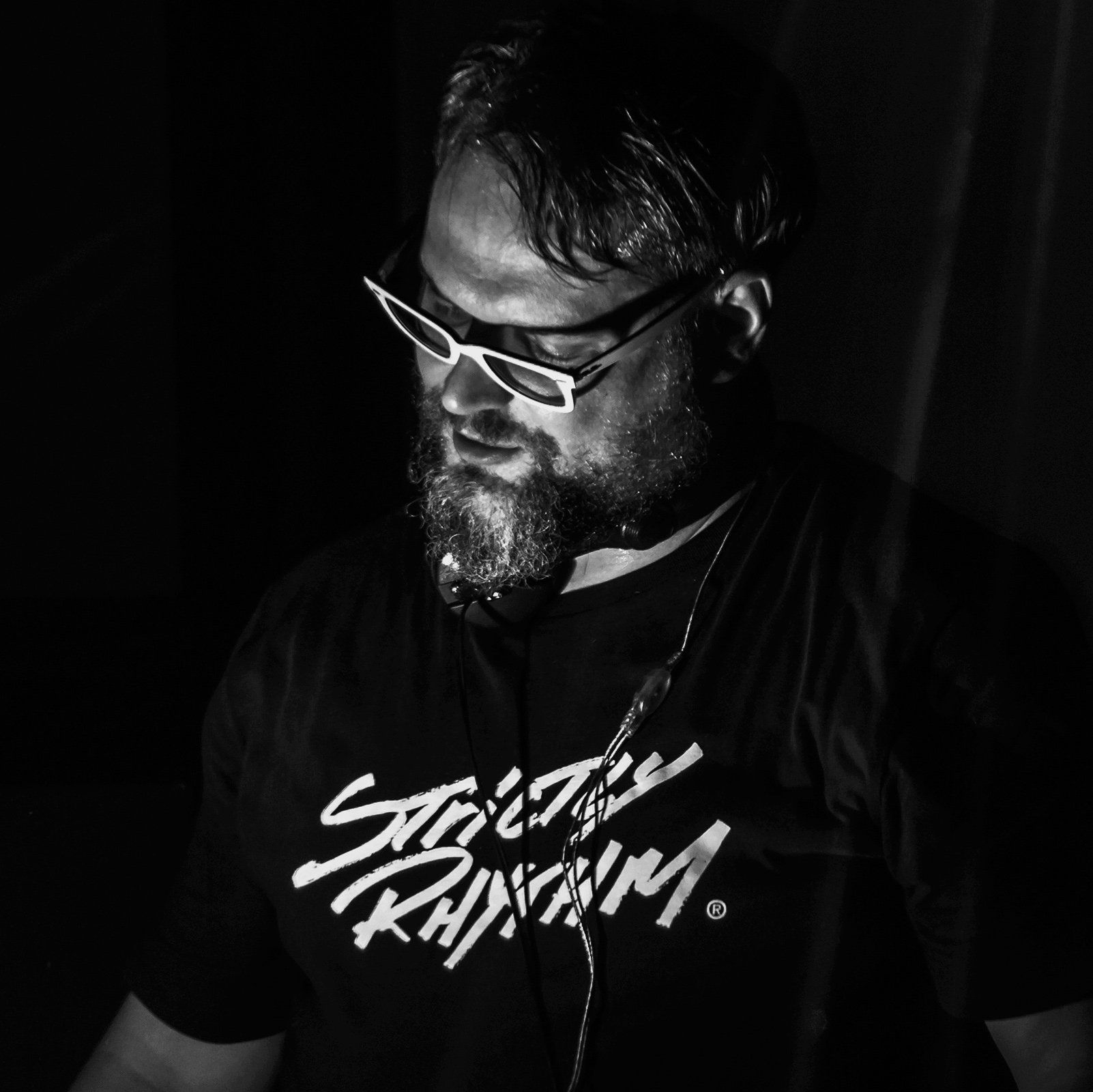 Boogie Pimps